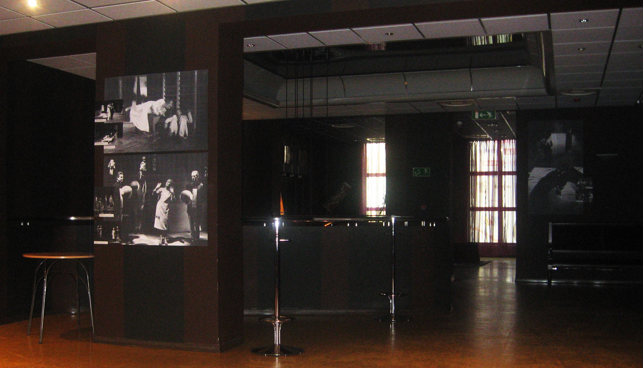 Kawiarenka w teatrze współczesnym